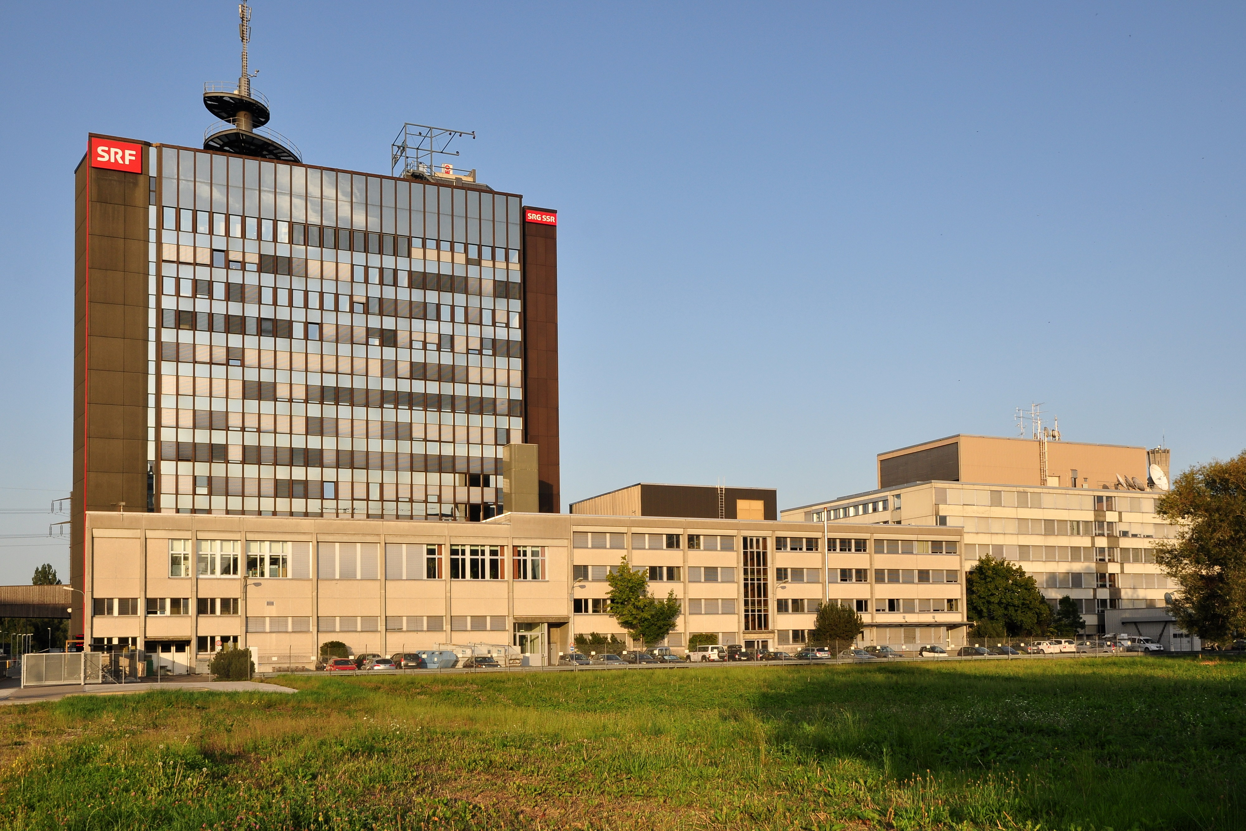 Schweizer Fernsehen DRS, Leutschenbach in Zürich-Seebach (Switzerland)